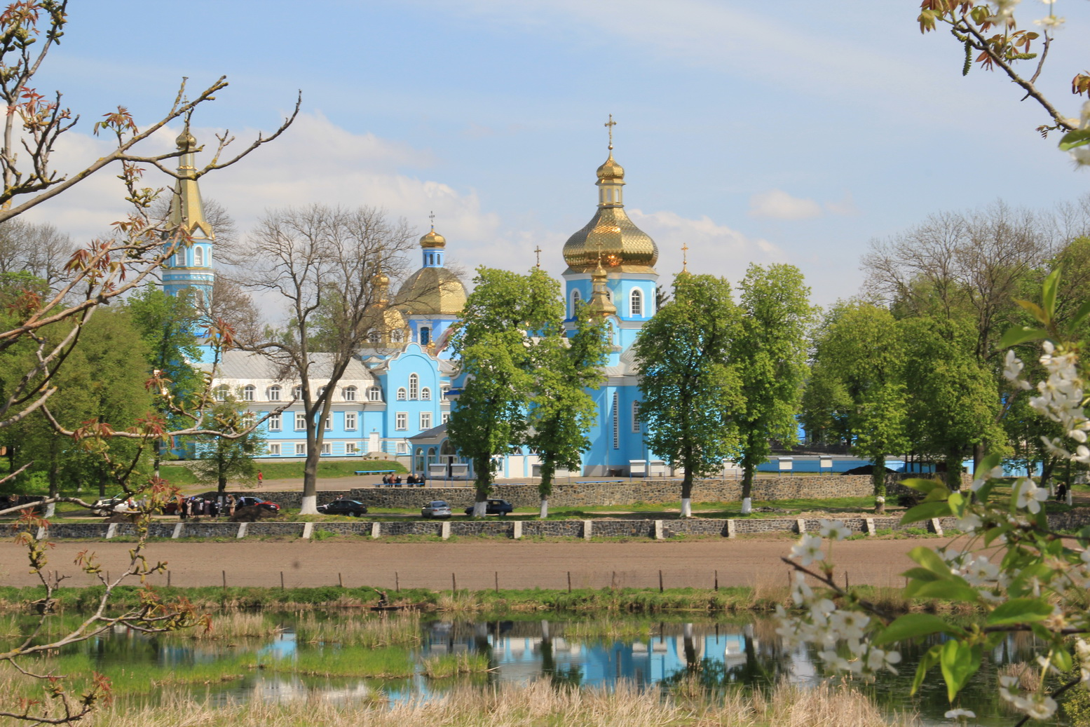 фото Свято-Миколаївського Городоцького жіночого монастиря